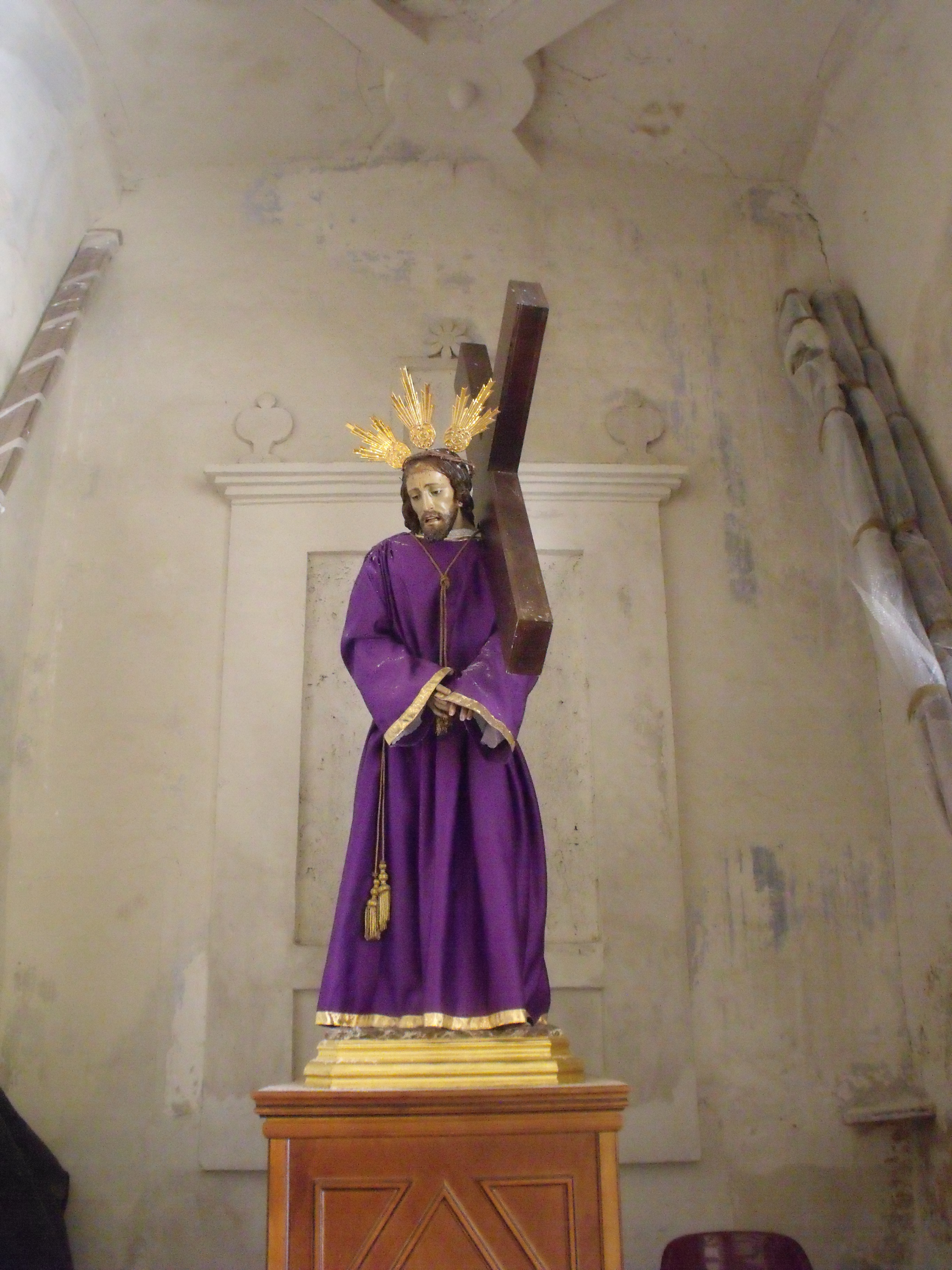 Imagen de un Nazareno en el interior de Santa María la Mayor de Ayora